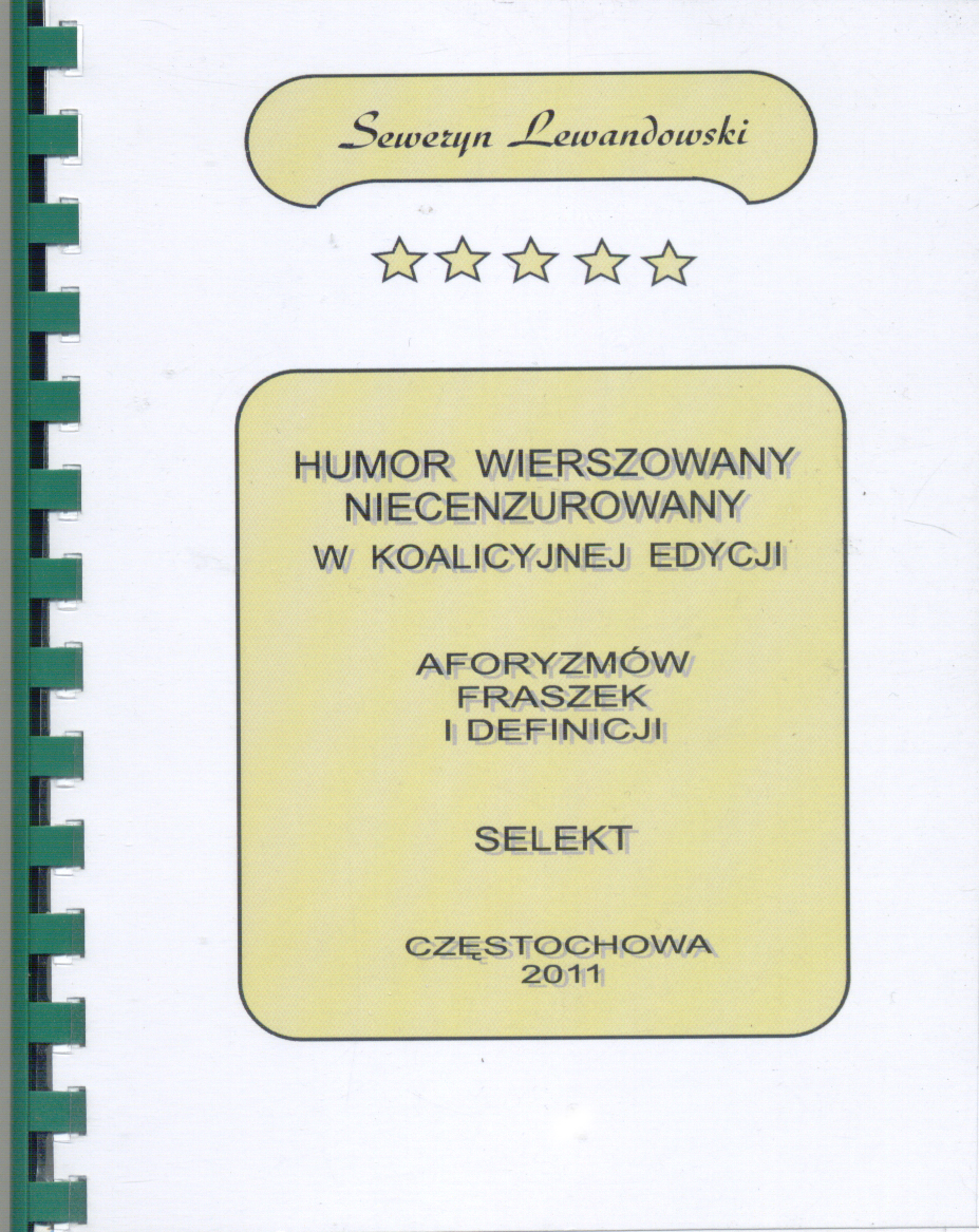 Humor wierszowany ... sekekt max